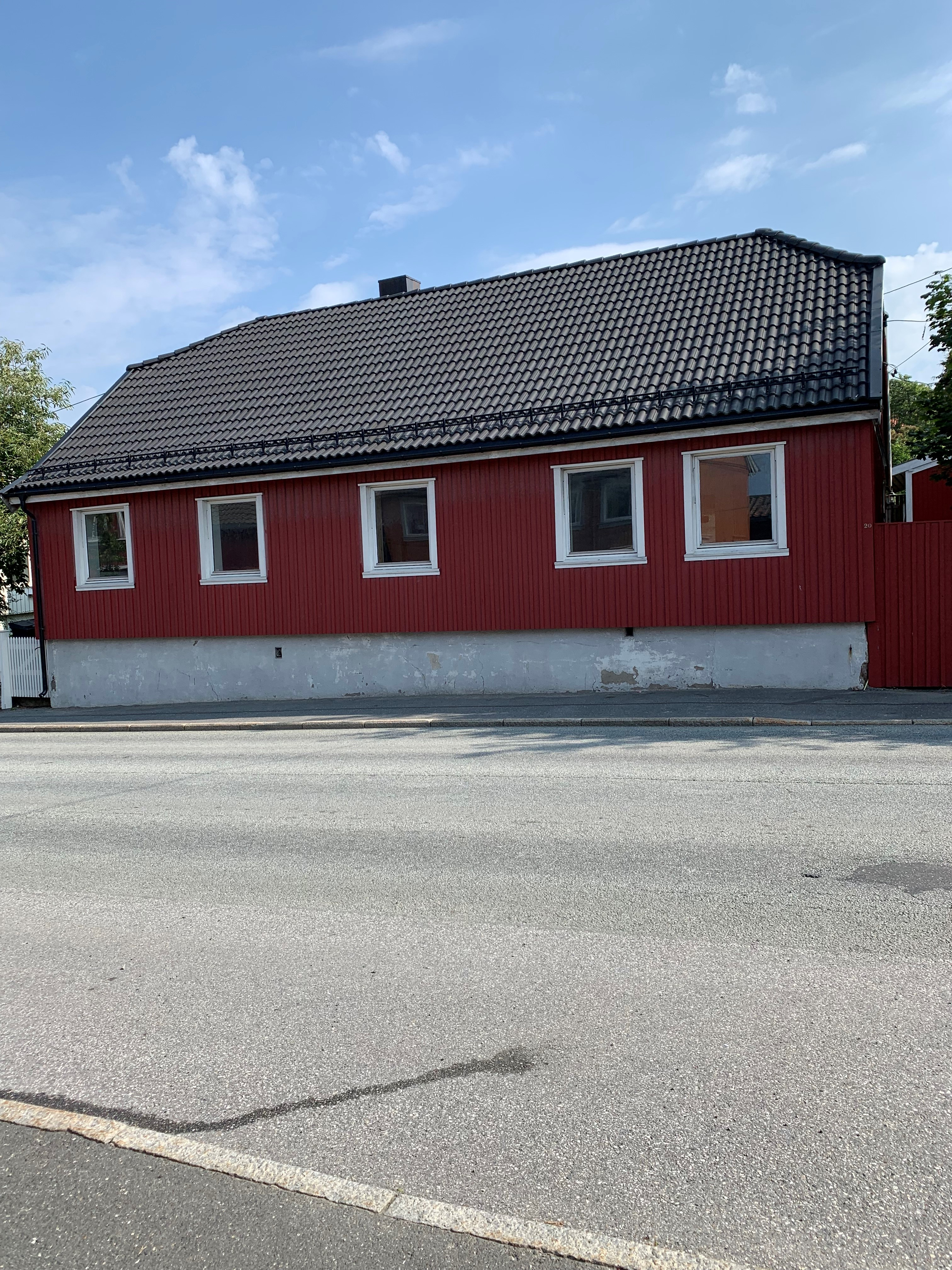 Klostergata 20 i dag